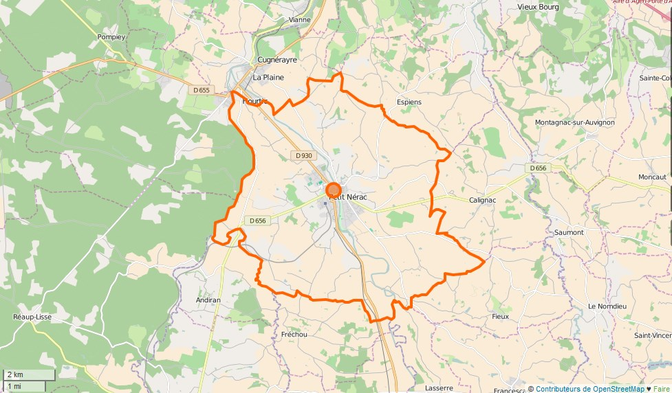 Nérac Limite communale This map may be incomplete, and may contain errors. Don't rely solely on it for navigation.